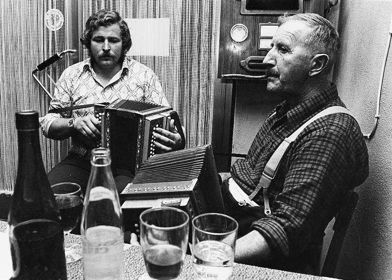 Paul Lüönd mit Rees Gwerder im Theaterstubli Arth Kanton Schwyz 1975.